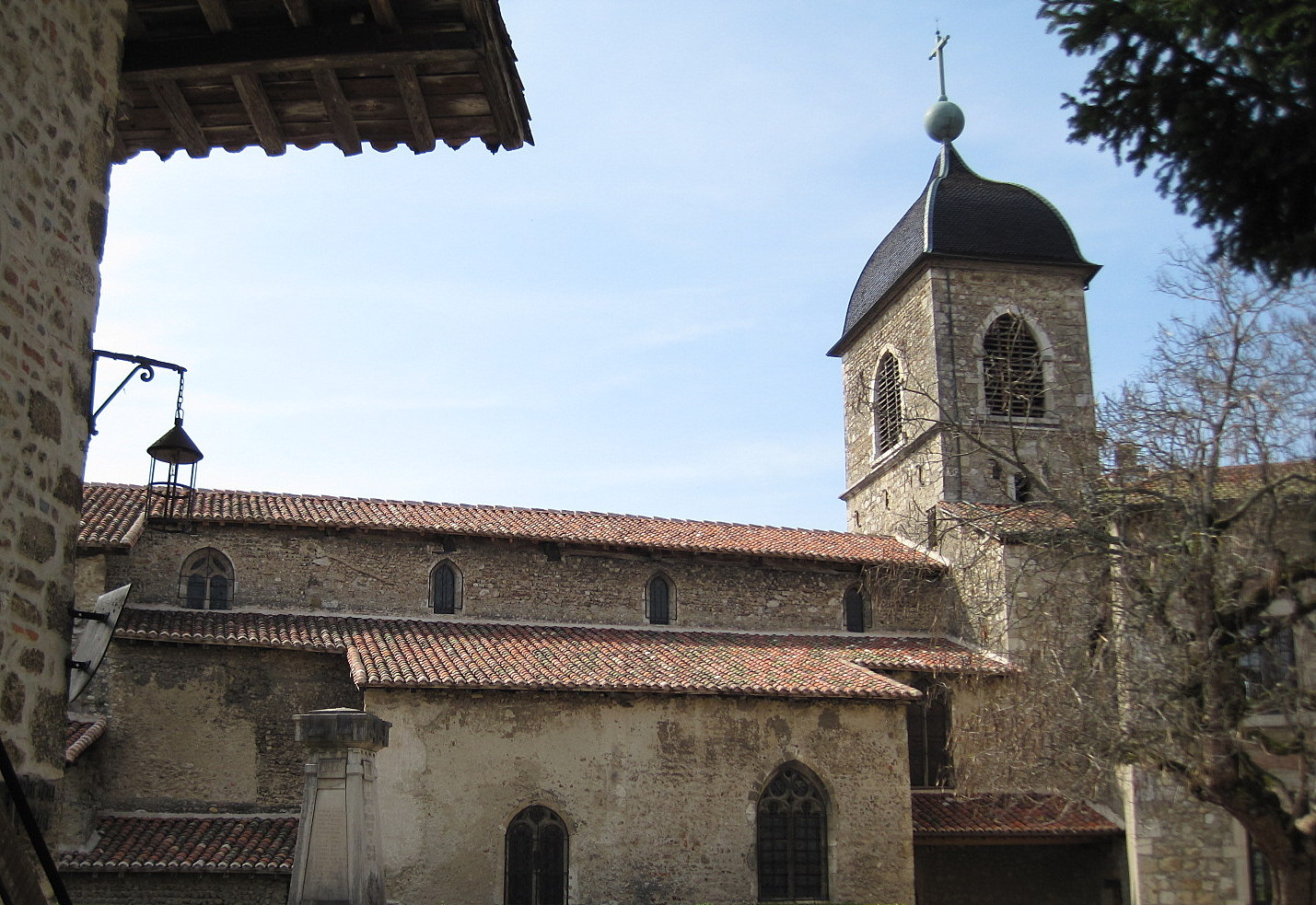 Pérouges